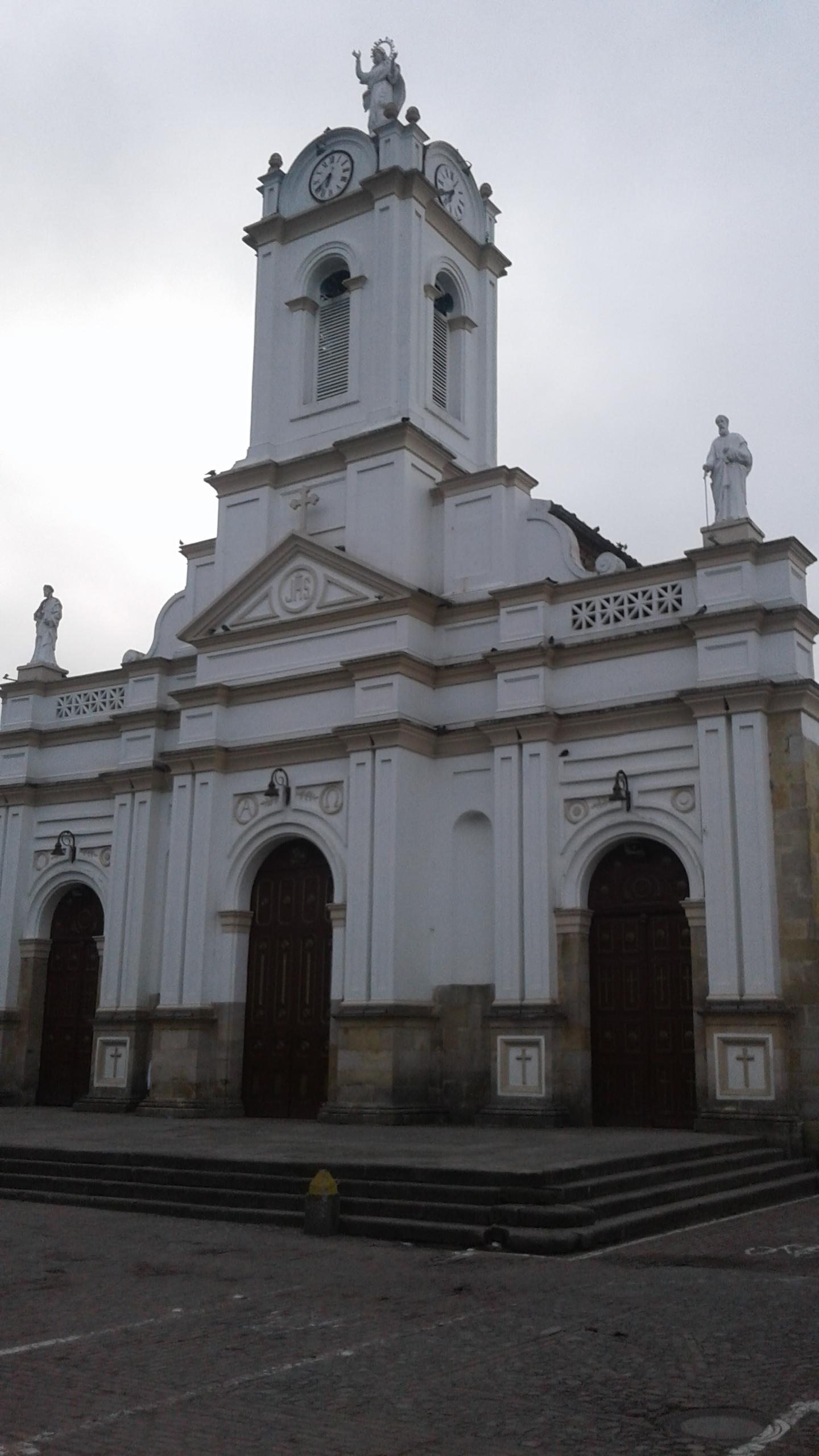 Iglesia de la Inmaculada Concepción (Tabio, Cundinamarca, Colombia)